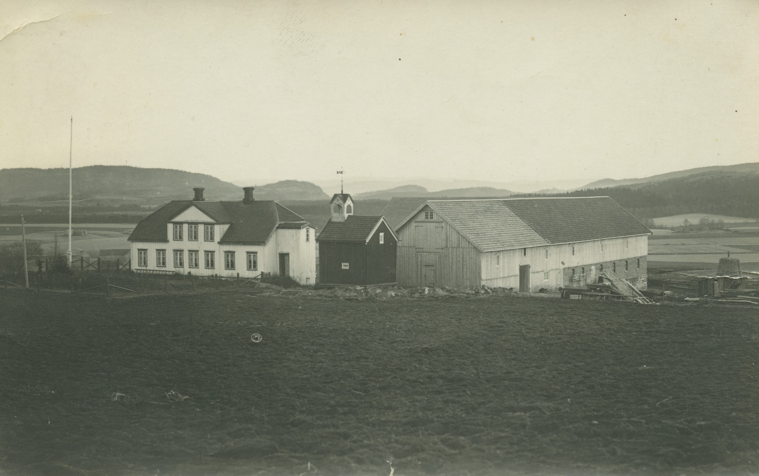 Ulve østre i Frol (Levanger) ca. 1915. Bildet er sendt som nyttårshilsen 1915–16 fra Sigurd Berg (sønn på gården) til Fridtjov Mo. De gikk sammen på Mære landbruksskole. Fotograf / Photographer: Ukjent Fotoeier / Photo owner: Liv og Jon Wold Mo Digitalisering / Digitizing: Arne Langås Foto-ID / Photo ID: 070-0180 Hvis bildet gjengis i andre sammenhenger, oppgi Åsen Museum og Historielag, fotoeier og fotograf som kildereferanse. Har du utfyllende opplysninger? Legg gjerne igjen en kommentar nedenfor eller send e-post til . | If you re-use this photo, please refer to Åsen Museum og Historielag, the photographer and the owner of the photo. Do you have additional information? Please leave a comment or send an e-mail to .